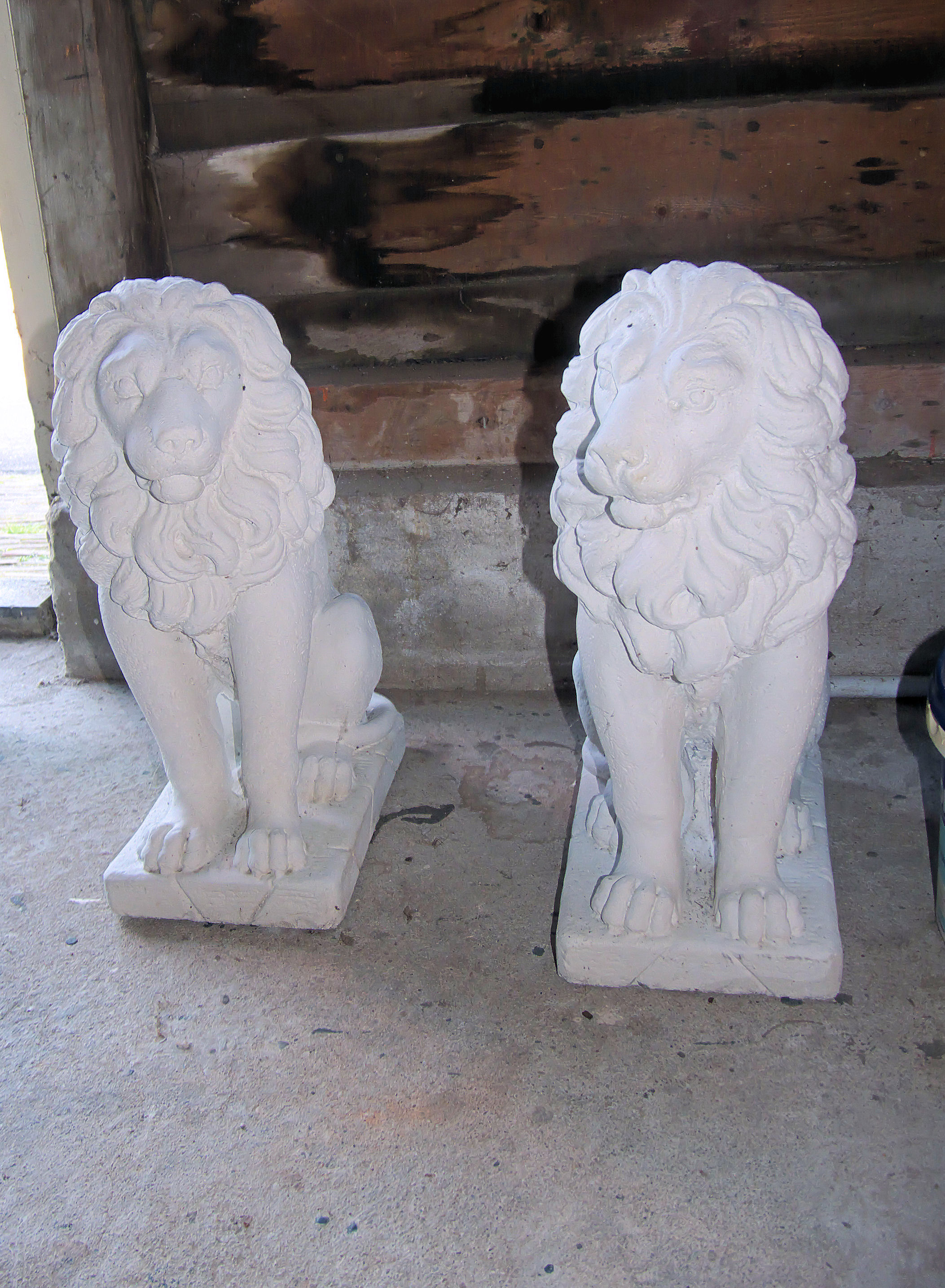 Krijtmolen d'Admiraal leeuwtjes